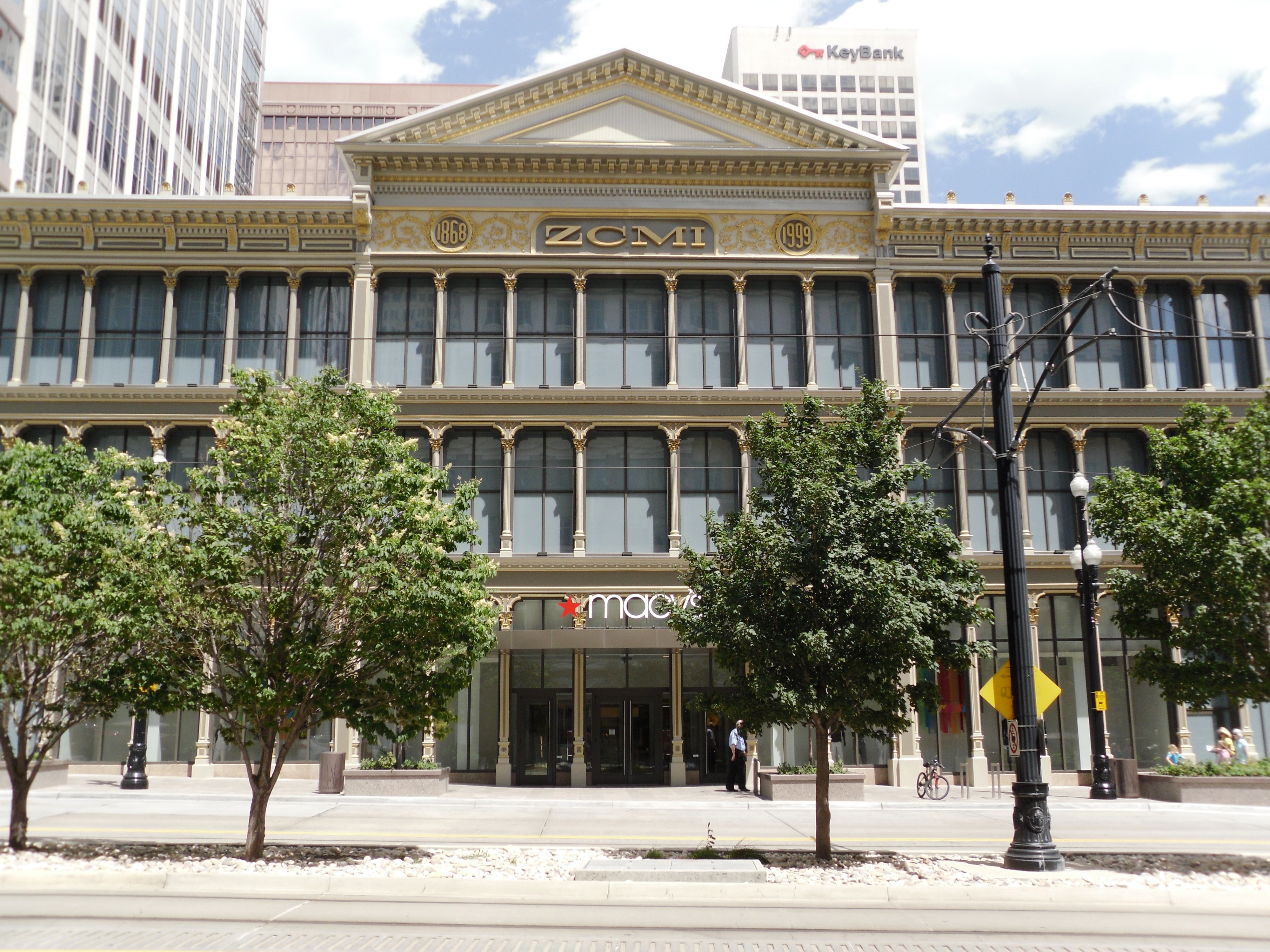 ZCMI / Macy's